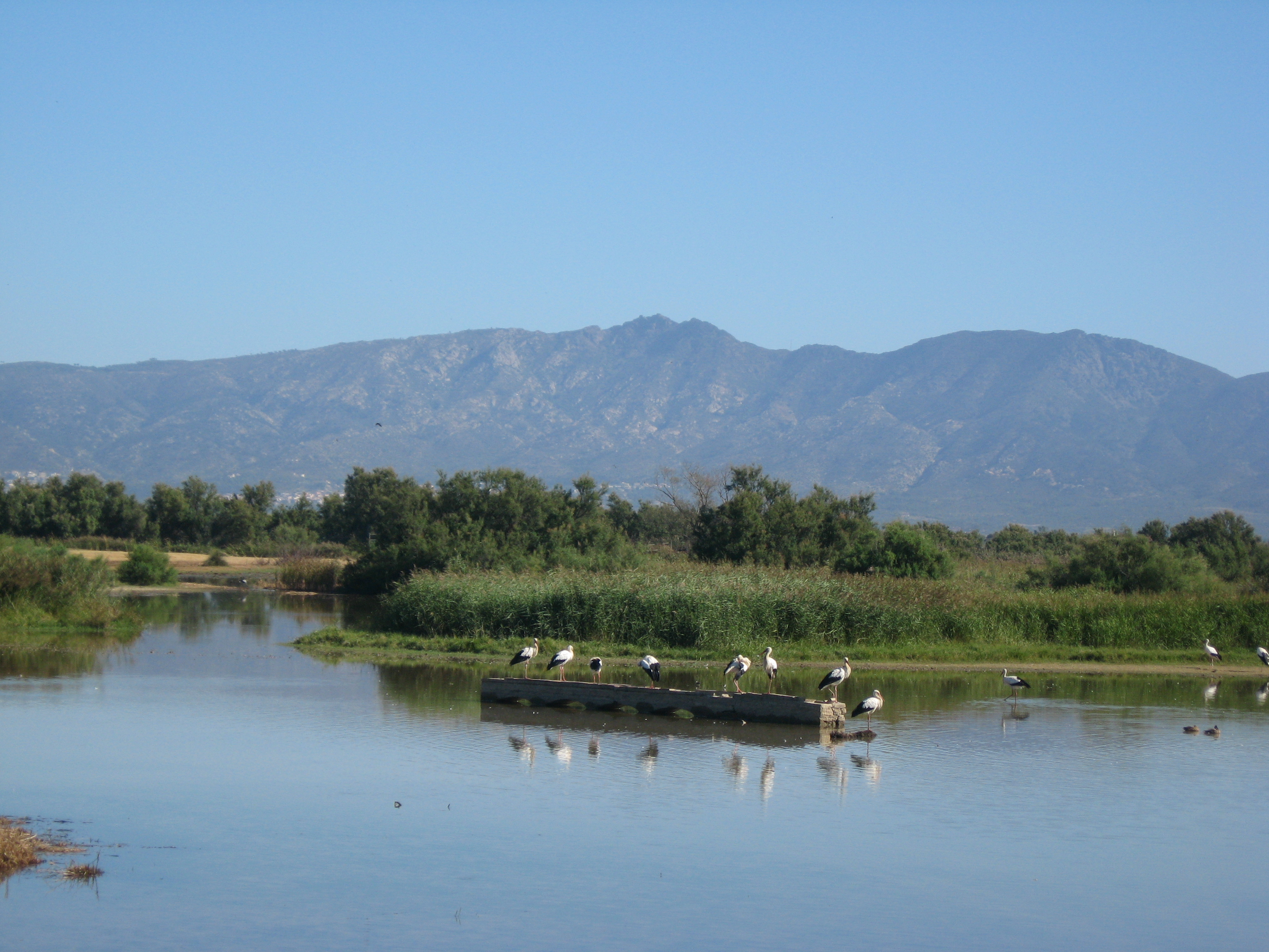 Naturpark Aiguamolls (Spanien/Katalonien) Datum: 15.09.2010 Urheber: Michael Pfeiffer alias Benutzer:Gordito1869 Quelle: privates Fotoarchiv des Urhebers